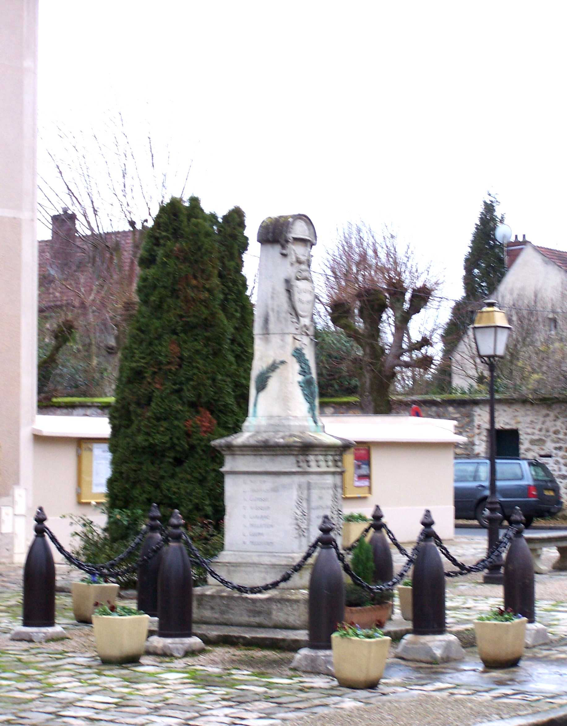 Monument aux morts des Alluets-le-Roi (Yvelines, France)